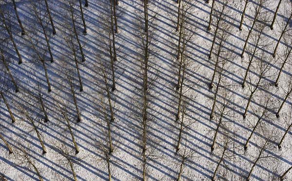 Vue aérienne verticale d'une peupleraie enneigée.